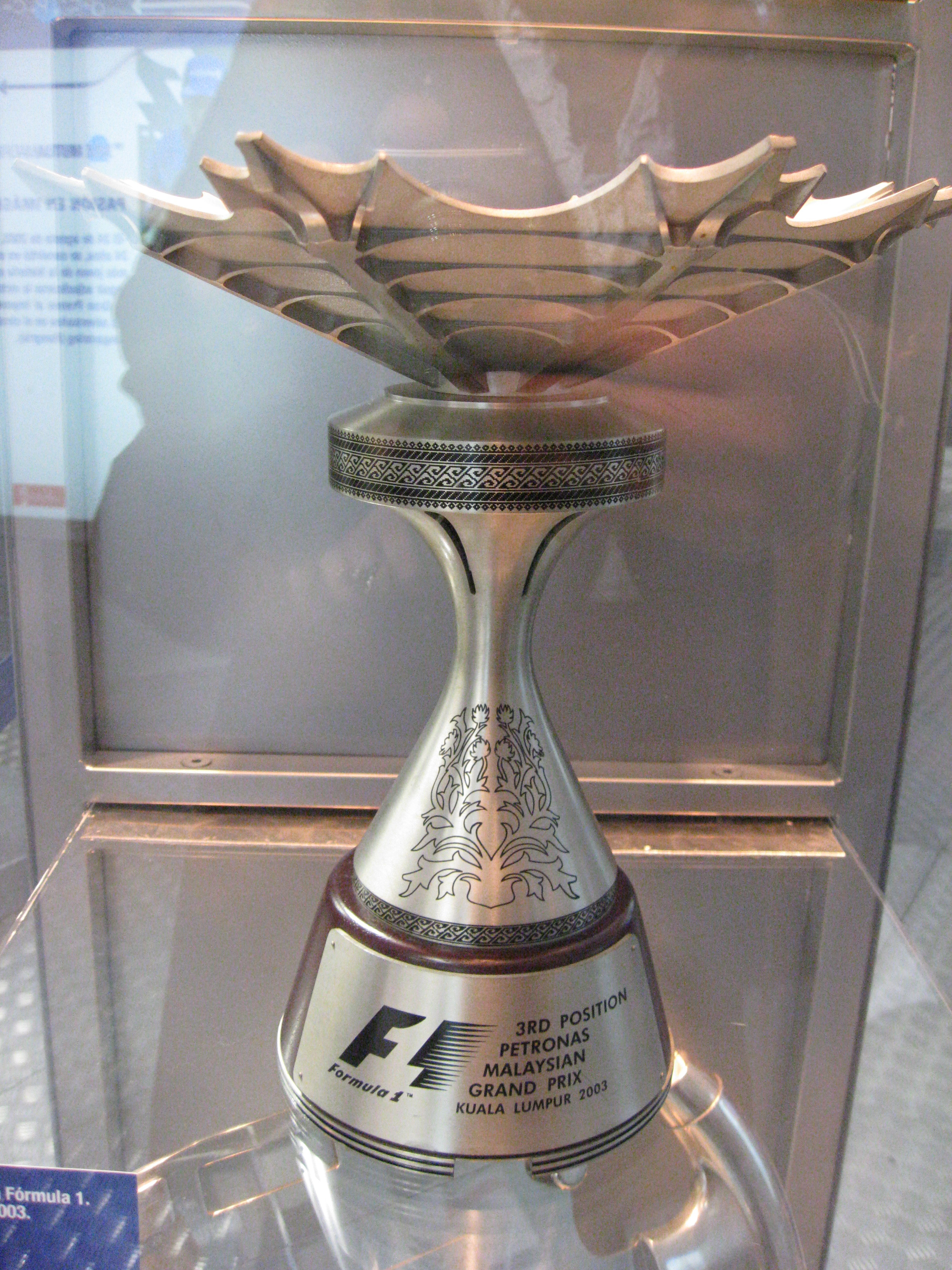 Trofeo del tercer puesto del gran premio de Malasia en el 2003